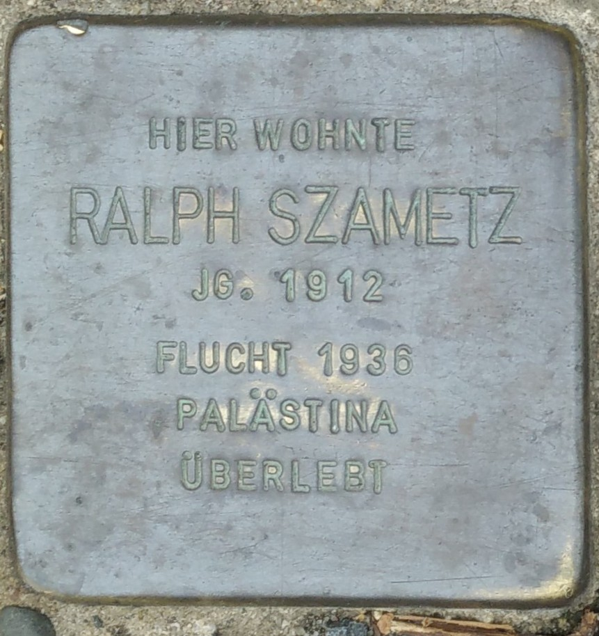 Bad Vilbel, Stolperstein Ralph Szametz